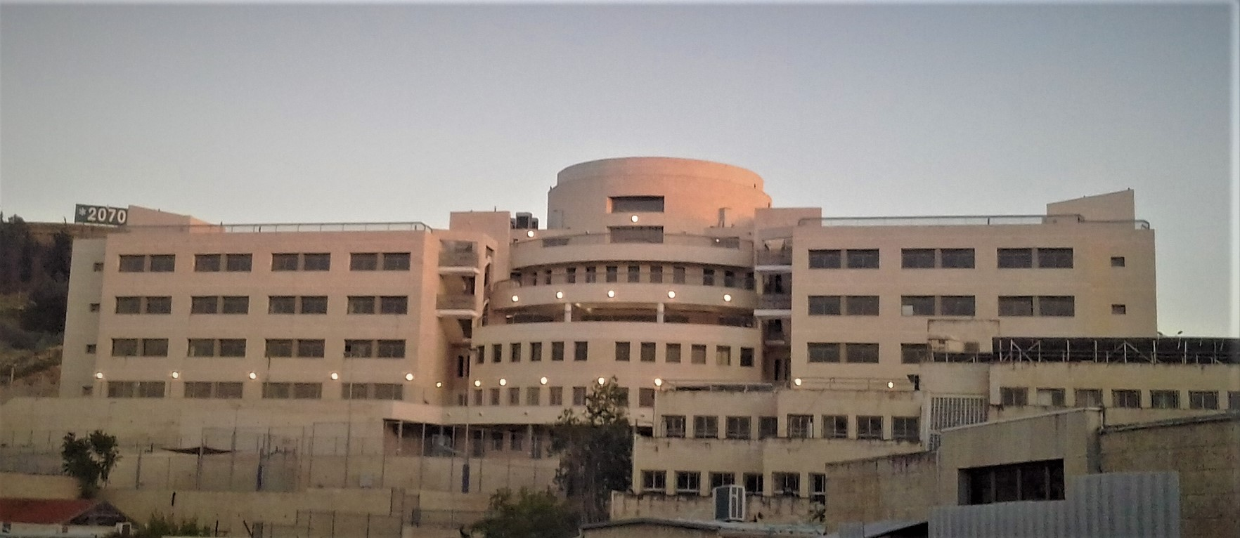 הבניין החדש של סמינר בנות אלישבע בראשות הגאון רבי יעקב הלל שליט"א בשכונת רמות, מאי 2020